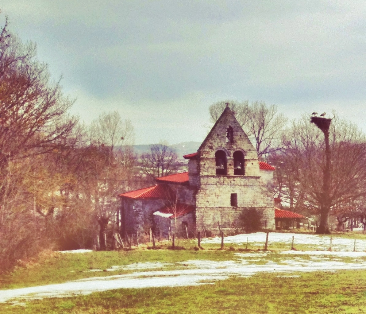 Dos cigüeñas junto a la iglesia parroquial de Virtus.